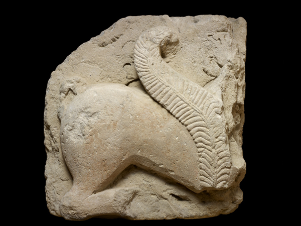 Esfinge de El Salobral (Cultura Ibérica). Número de inventario: 38443.